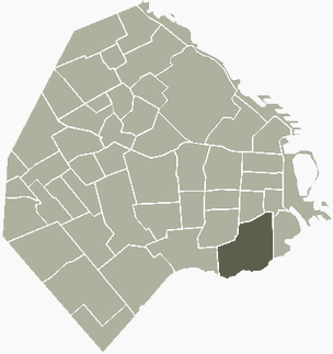 Barrio de Barracas